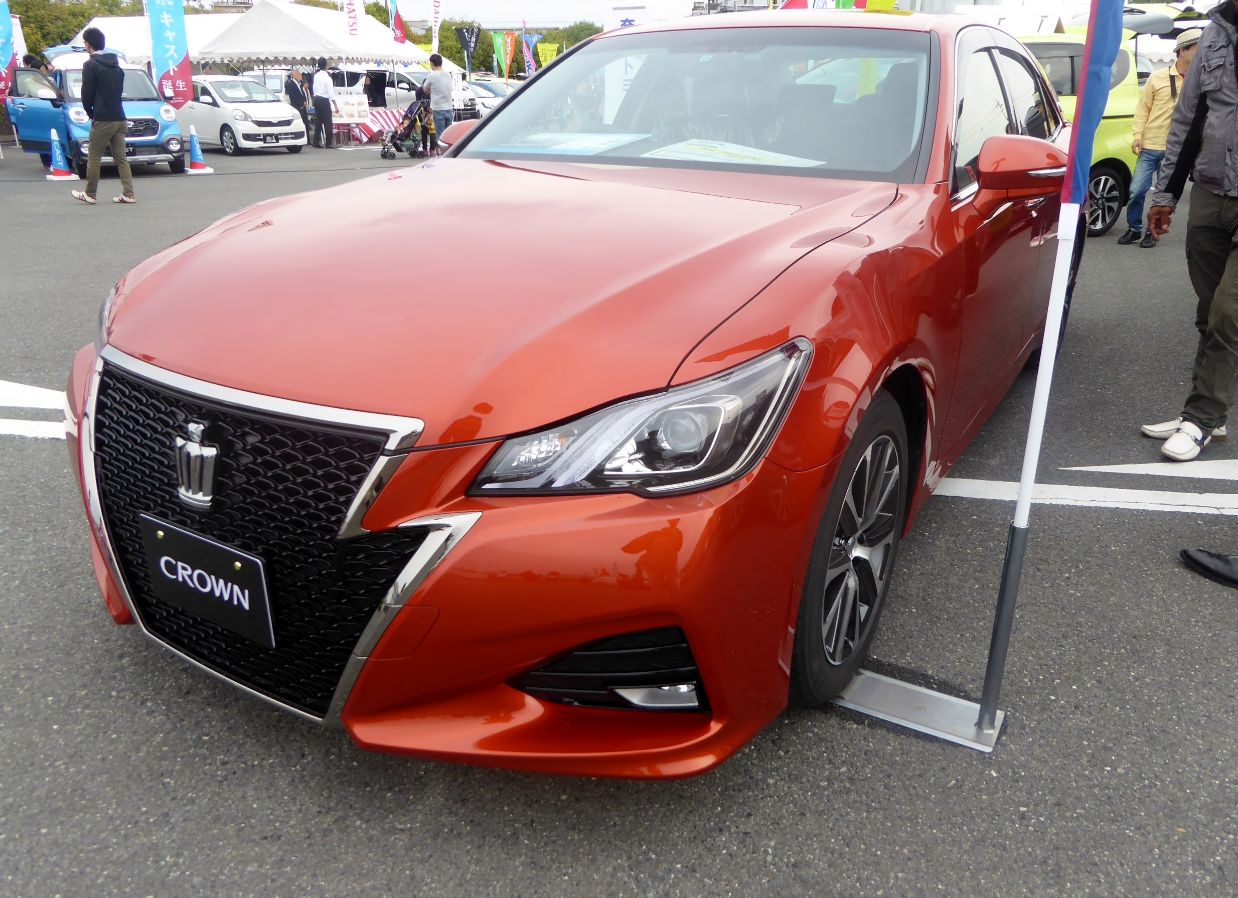 DBA-ARS210-AEZXZ型トヨタ・クラウン2.0アスリートS-Tをフロントから撮影。